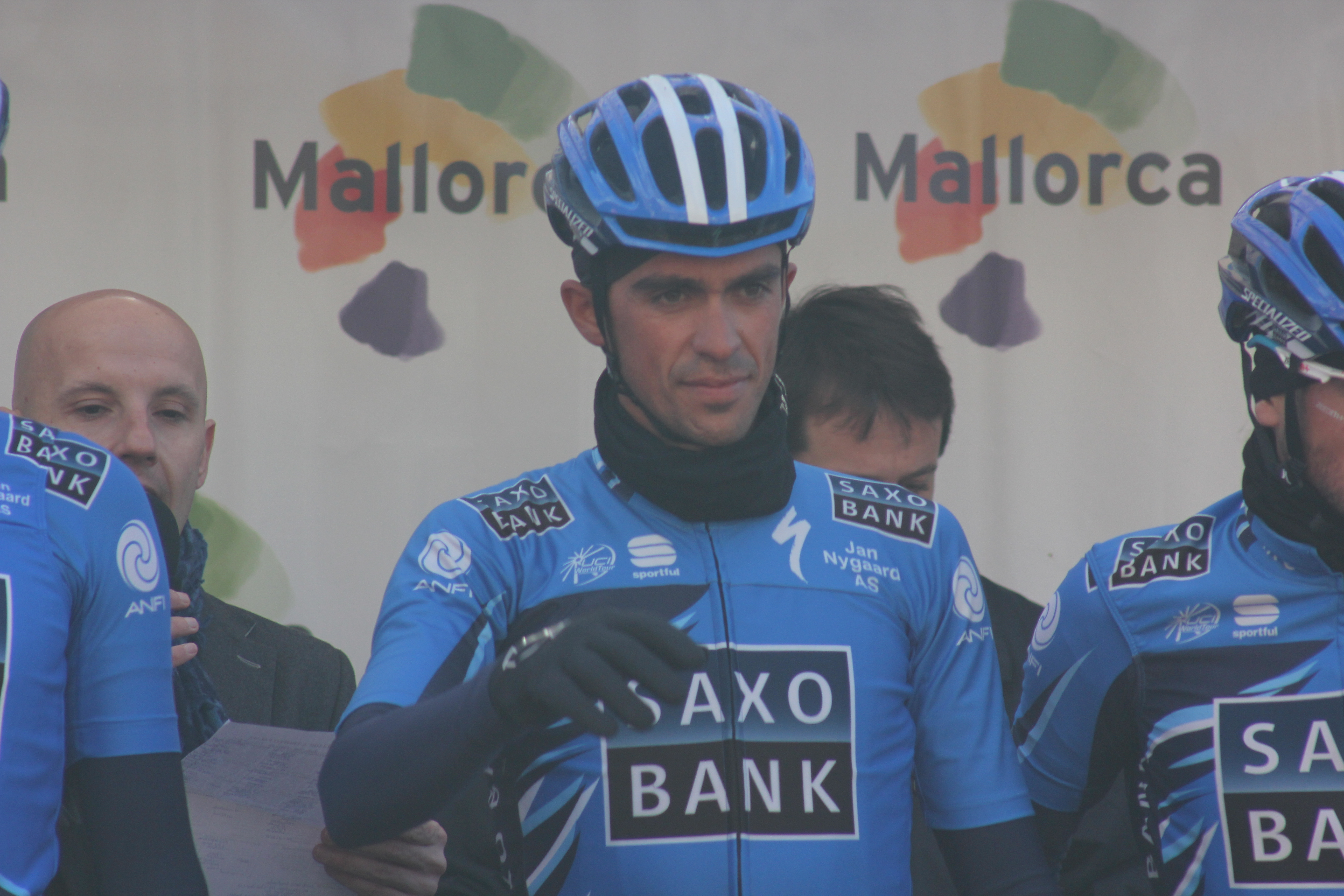 Le Trofeo Palma du Challenge de Majorque (Challenge Vuelta a Mallorca)